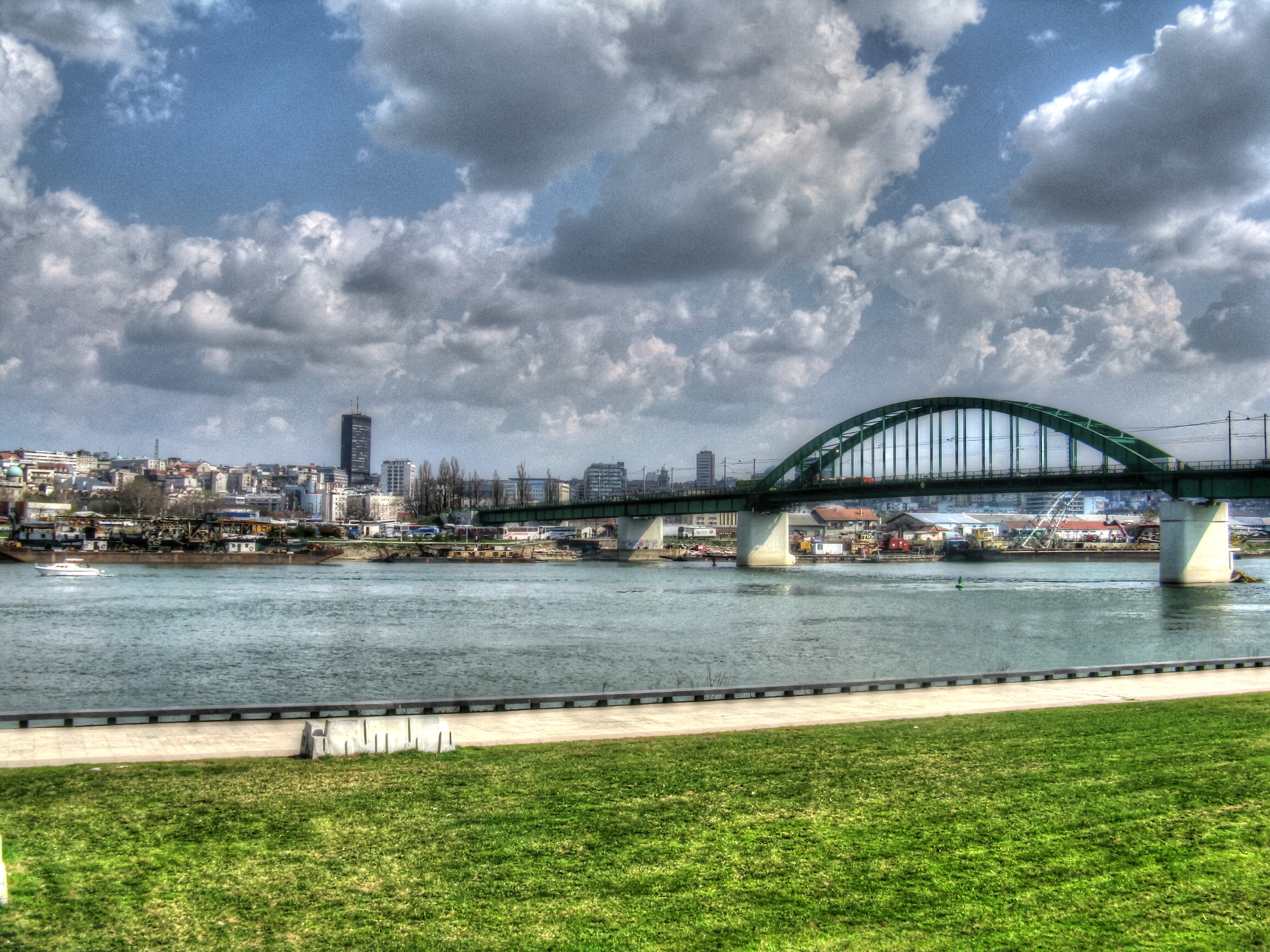 Belgrade